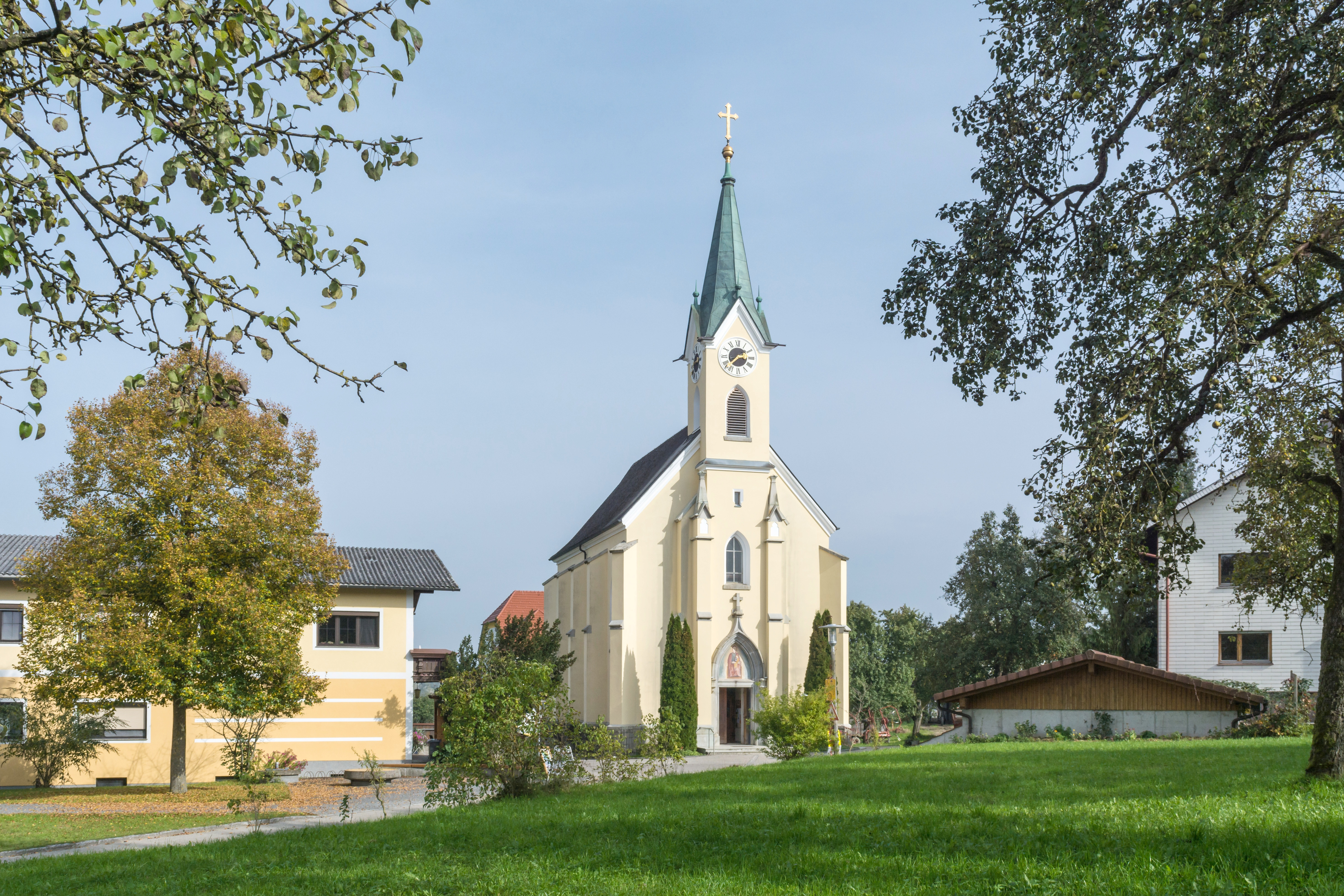 Die Expositurkirche Göttlicher Kinderfreund in Rutzenham wurde 1897 bis 1899 als Schulkapelle nach Plänen des Baumeisters Paul Hochegger errichtet. Der Hochaltar ist aus Carraramarmor. Auf den Fenstern im Chor sind Szenen aus der Kindheit Christi zu sehen. Die Bemalung des Innenraums ist noch im Originalzustand von 1901. Die Kirche ist durchgehend im neugotischen Stil gehalten.